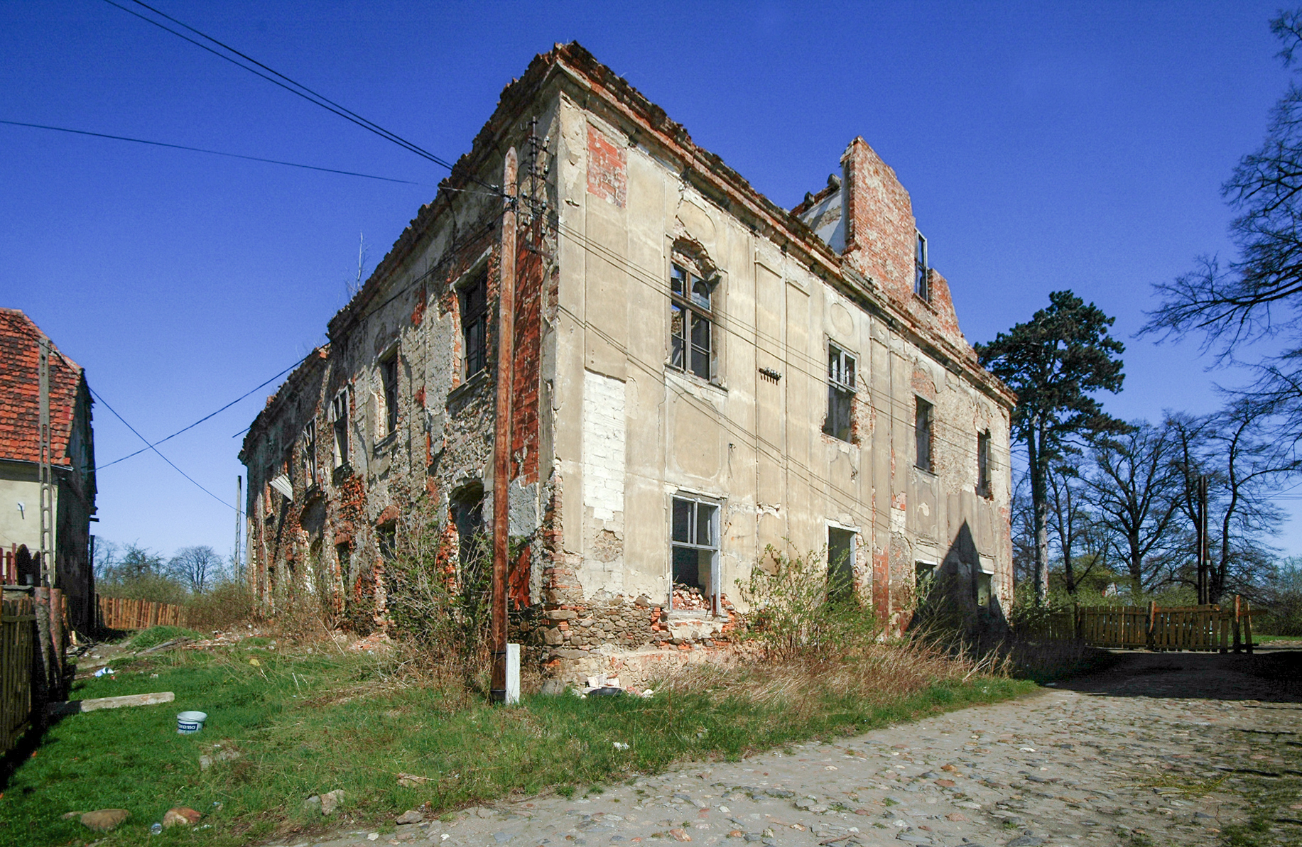 Piława Dolna, Krótka 2 - dwór, obecnie w ruinie (zabytek nr 463)